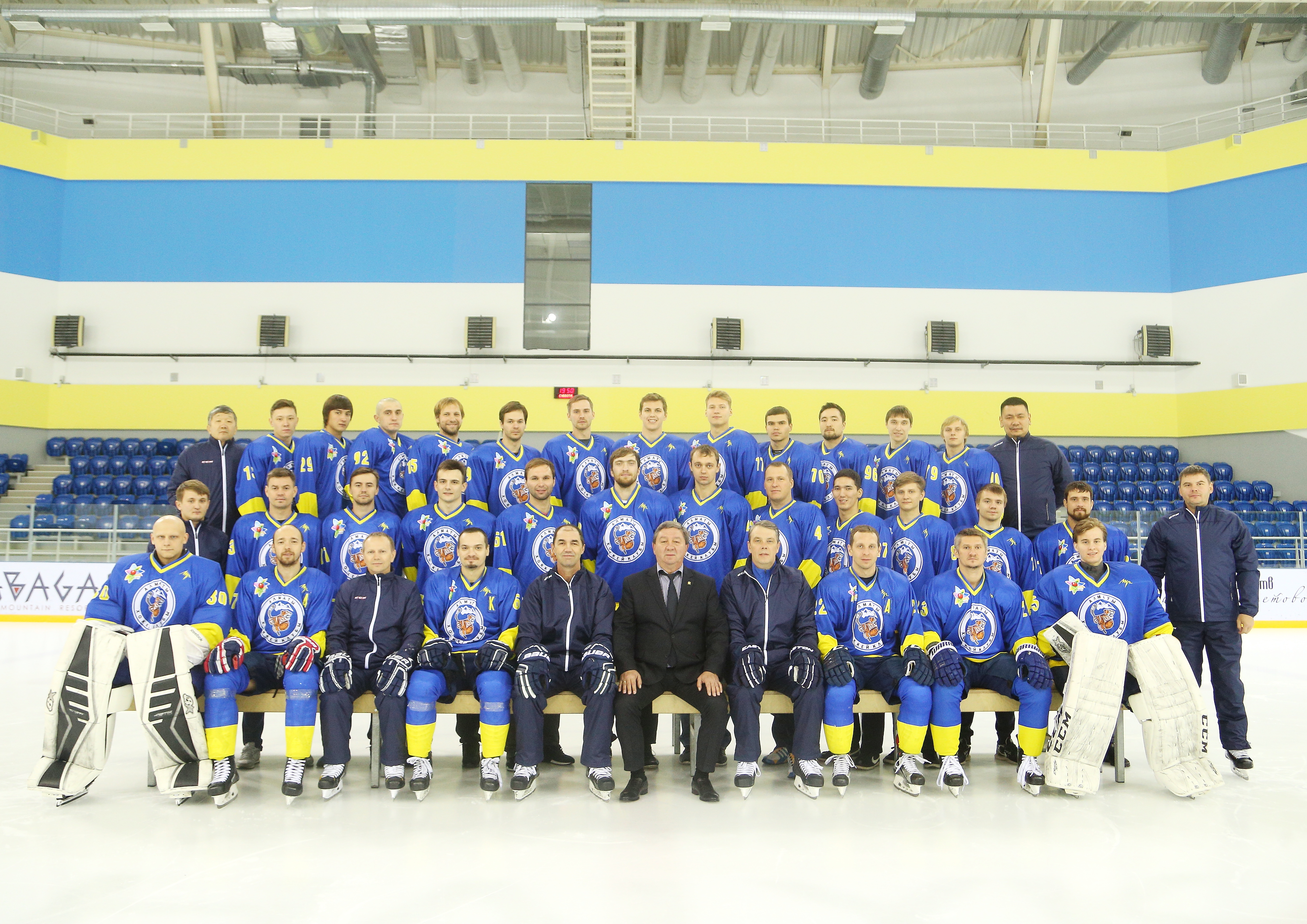 Состав команды на на начало сезона ОЧРК, 2017-18 гг.